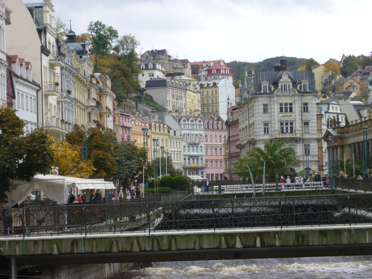 Karlovy Vary (Cidade Balneario), República Checa, Setembro 2007